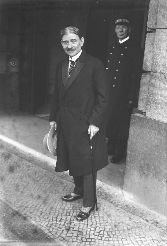 Der bedeutende englisch-amerikanische Schriftsteller Frank Harris ist, 75 Jahre alt, in Nizza gestorben! Der bedeutende Schriftsteller Frank Harris bei seinem letzten Besuch in Berlin.